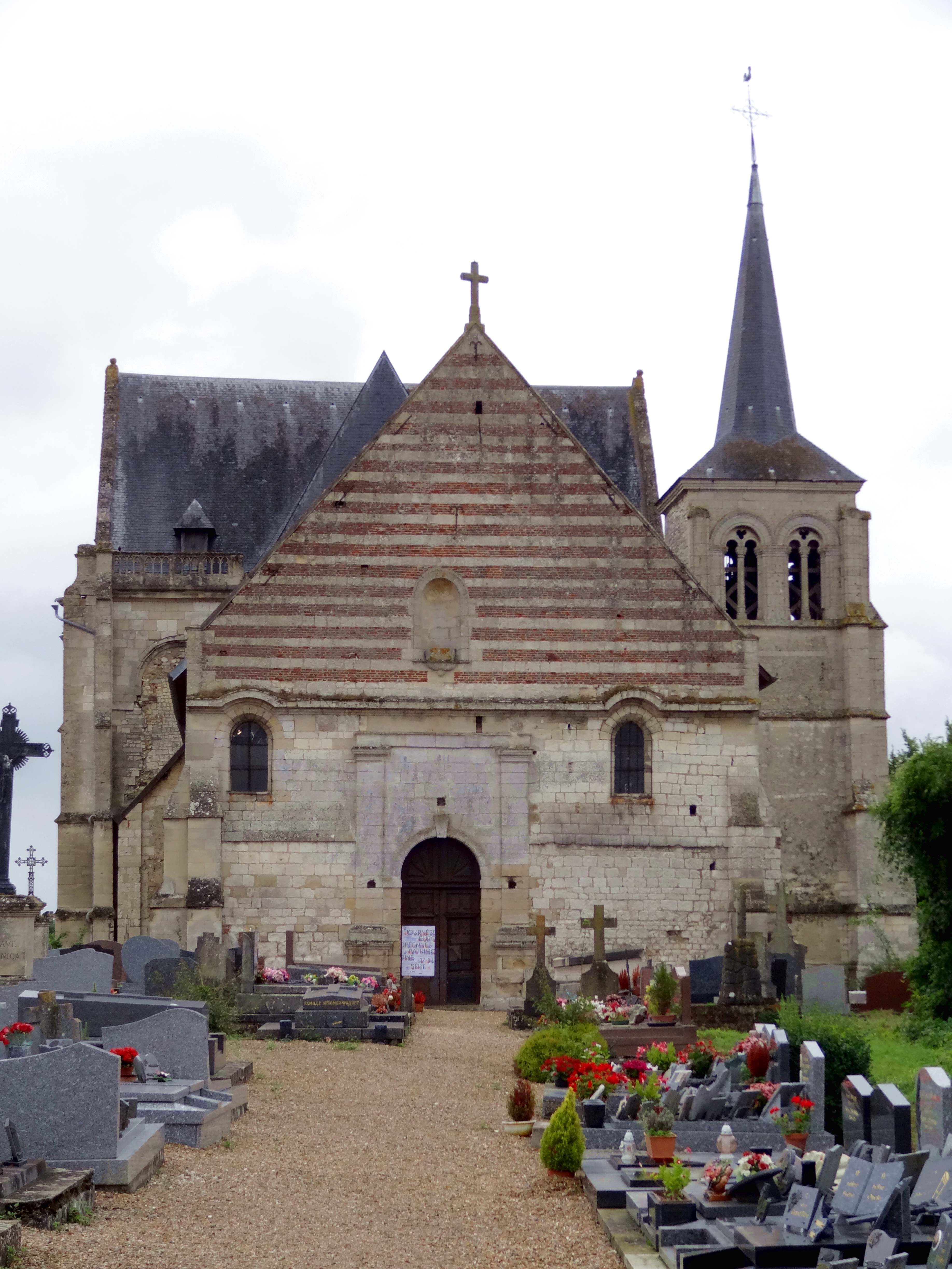 Église Saint-Ouen de Therdonne - voir titre.